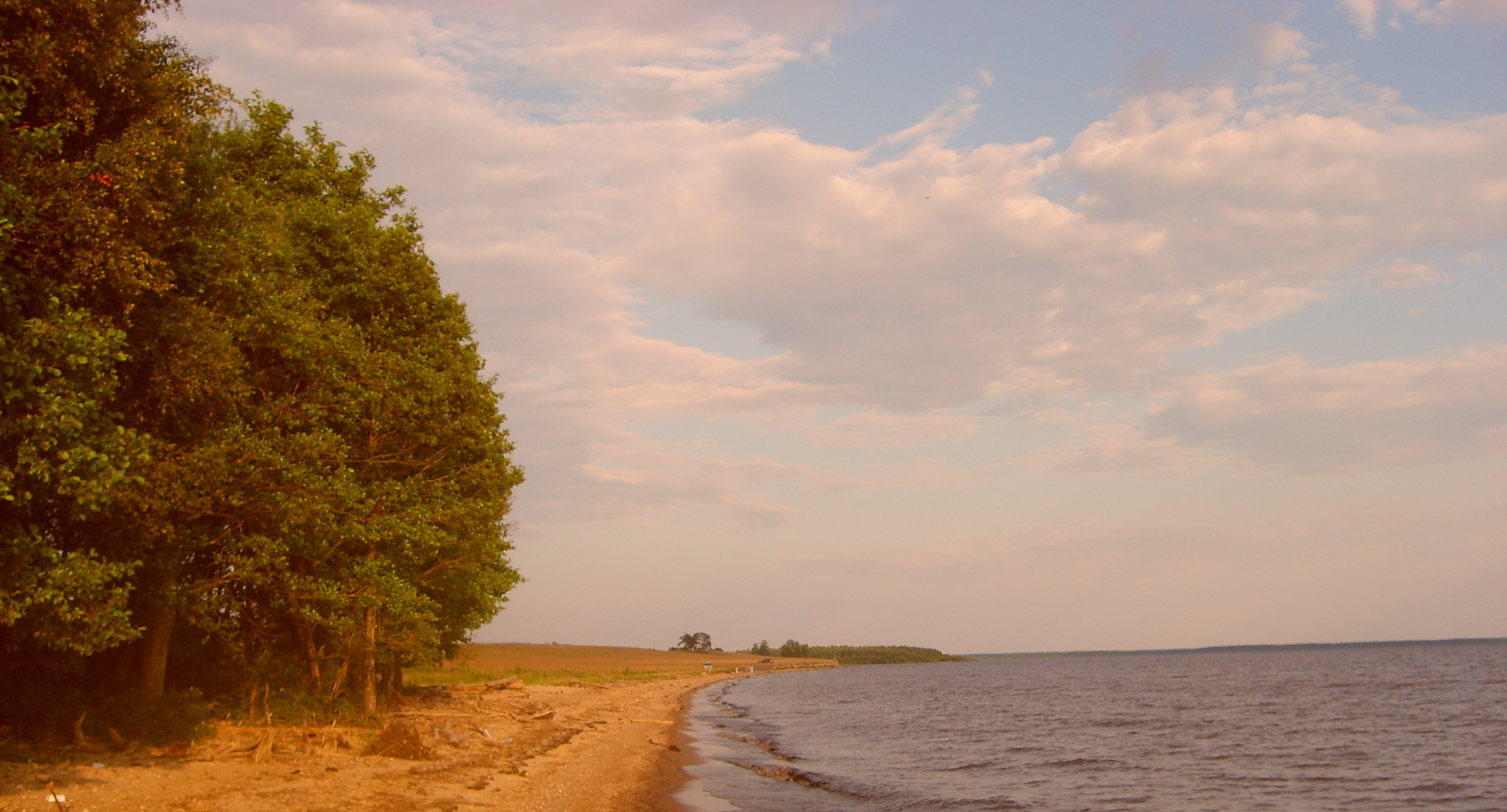 Рыбинское водохранилище около села Федорково Пошехонского района